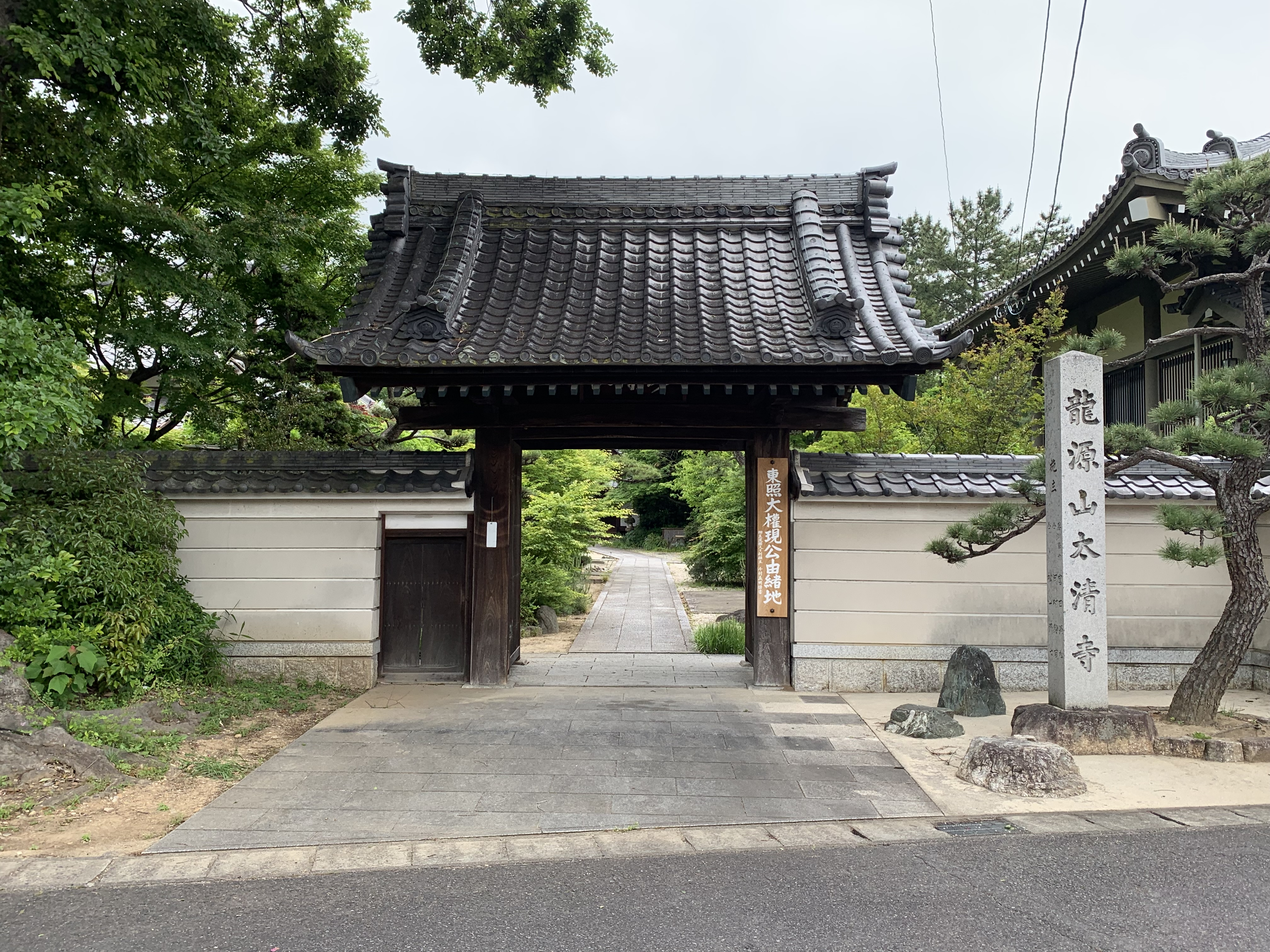 太清寺の門